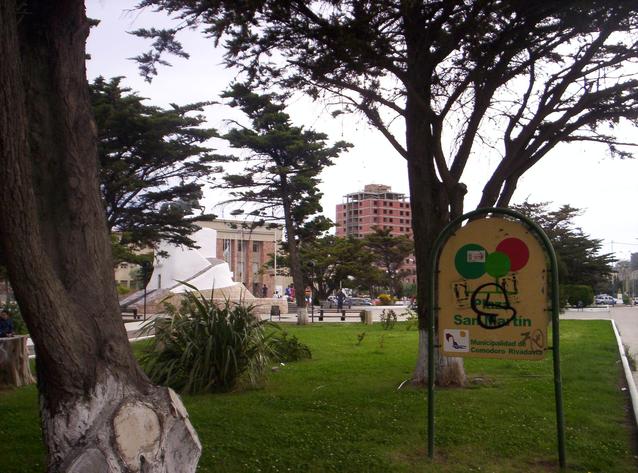 El Colegio Perito Moreno y la Plaza San Martín en su esplendor verde. Comodoro Rivadavia.